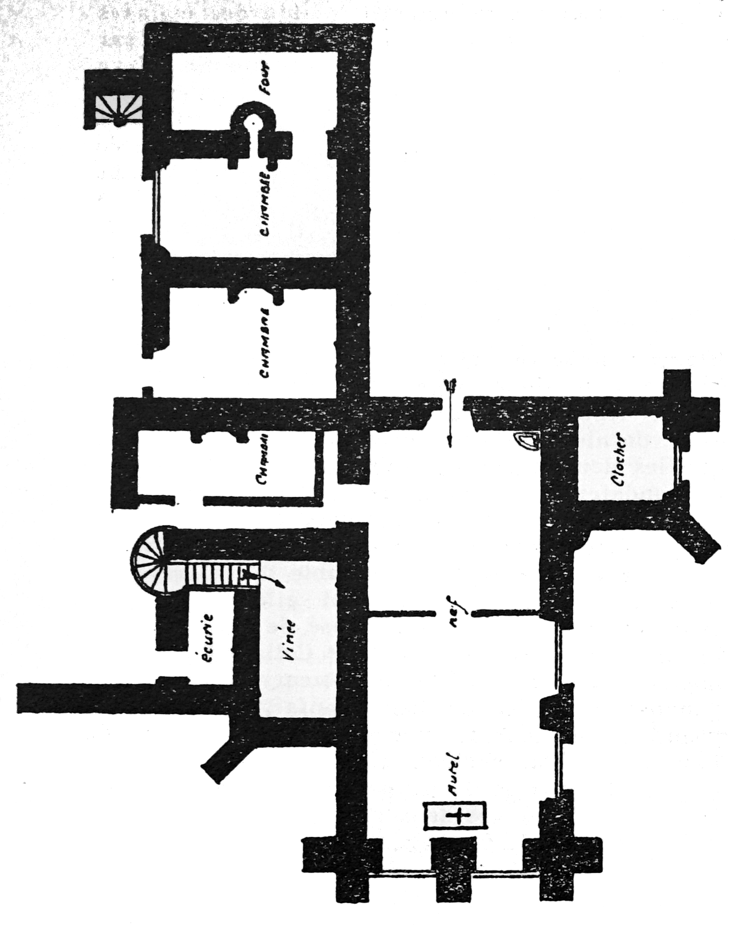 le Prieuré de villacerf relevé par Prevost.